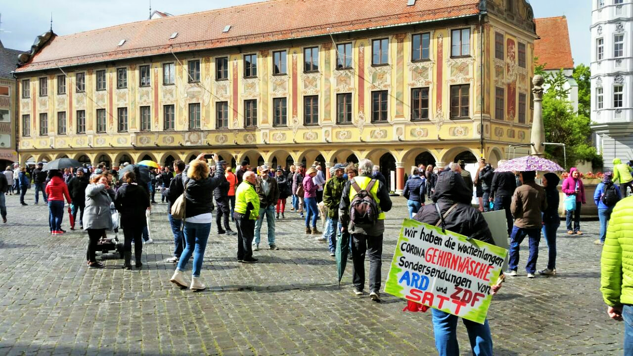 Corona-Kritiker Demo Marktplatz Memmingen; 2020